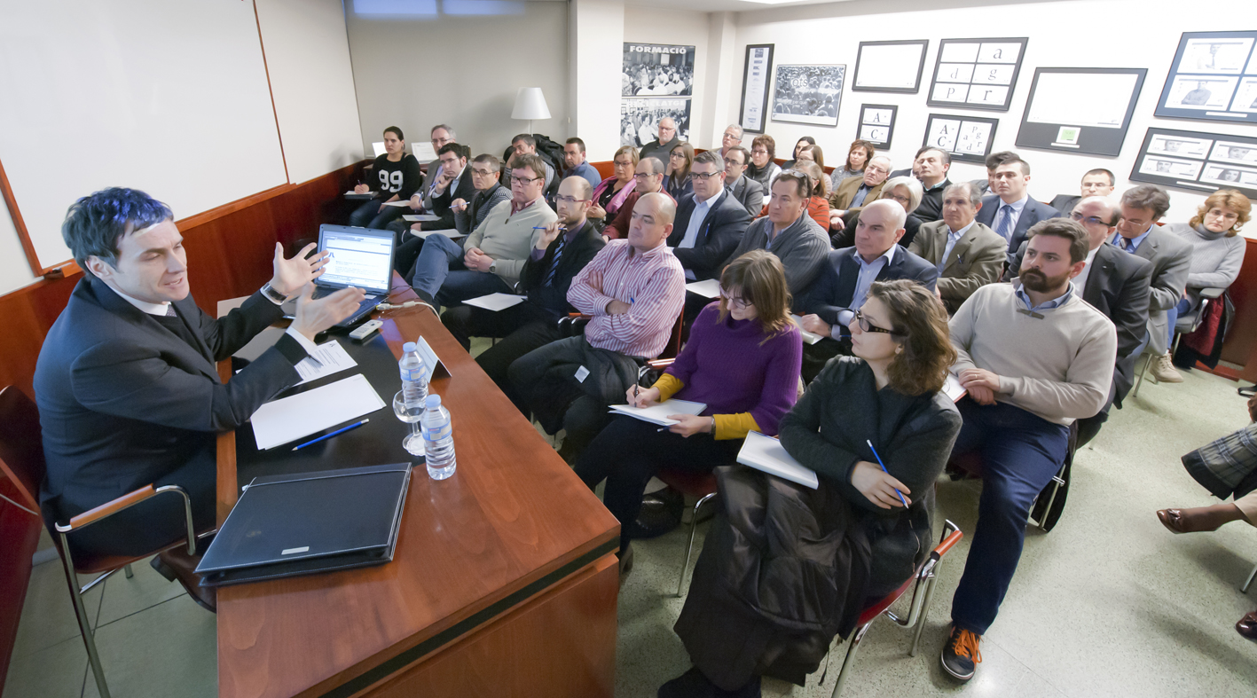 Aula Josep M. Domenech del Col·legi de Mediadors d'Assegurances de Girona